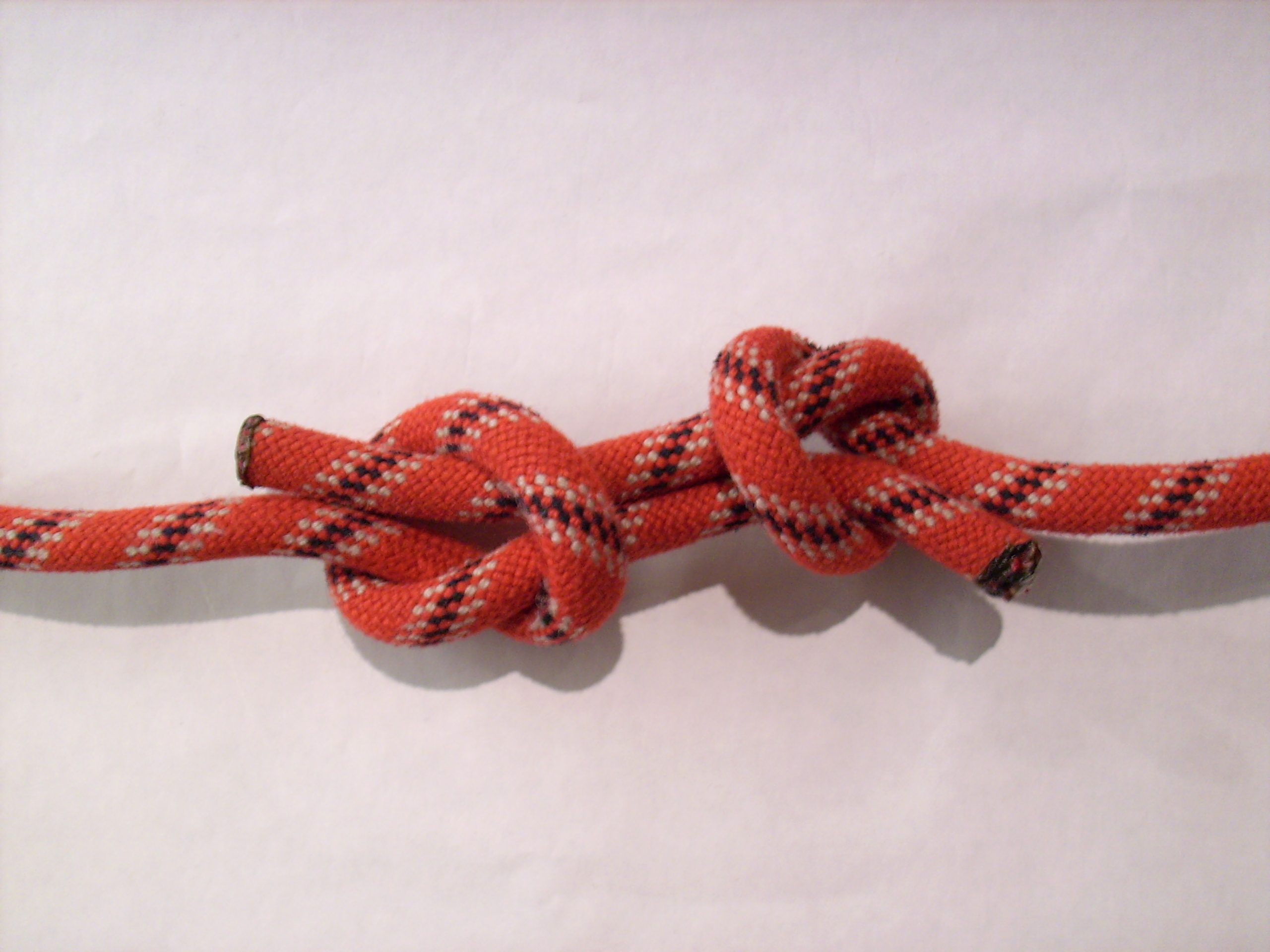 ! falscher Spierenstich !